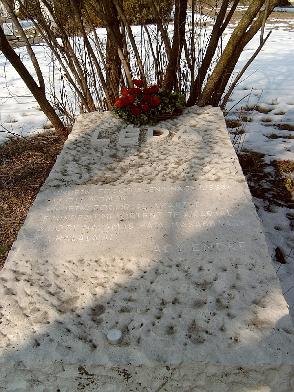 Brüll Adél sírja Budapesten. Kerepesi temető: 35-1-51.